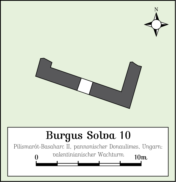 Burgus Solva 10, Pilismarót-Basaharc II (Wachturm 2), Ungarn, valentinianischer Burgus. Quelle: Zsolt Máté (Hrsg.): Frontiers of the Roman Empire – Ripa Pannonica in Hungary (RPH), Nomination Statement, Vol. 2, National Office of Cultural Heritage, Budapest 2011, S. 255.